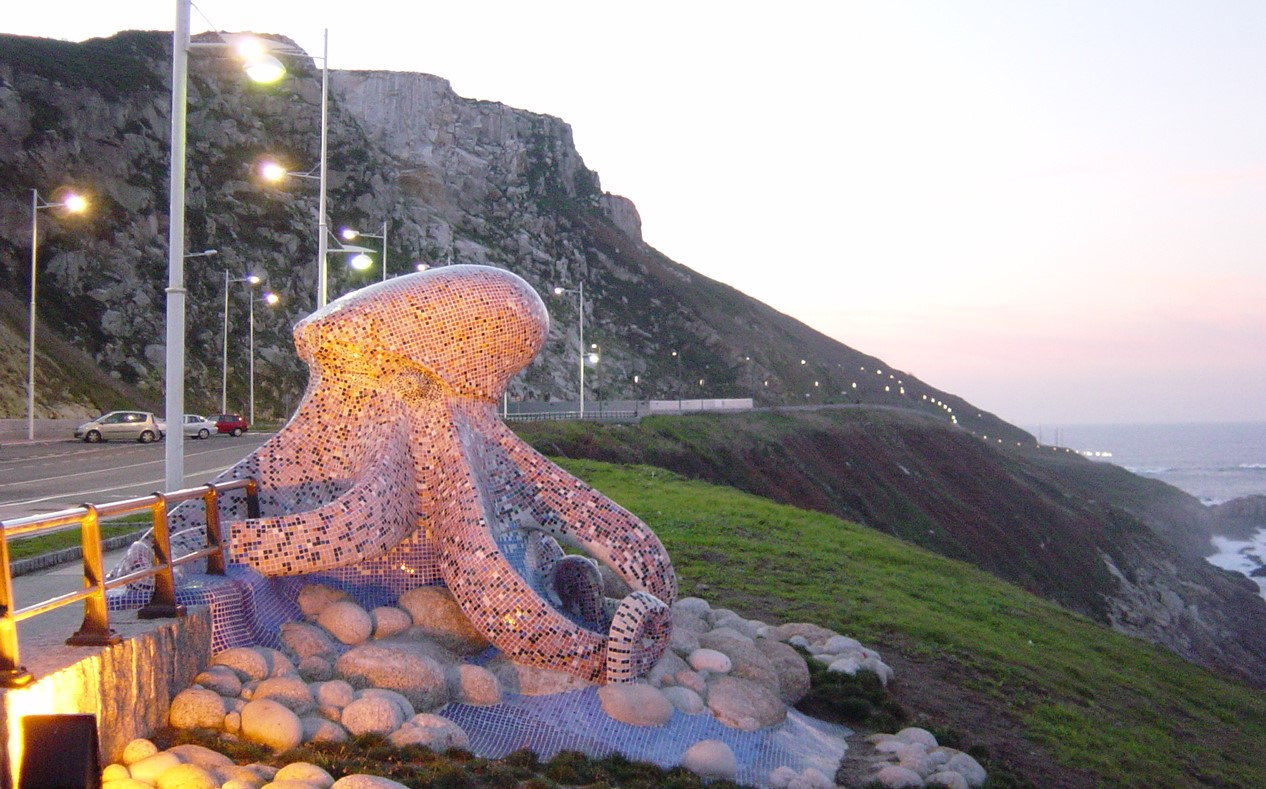 Es una escultura del paseo marítimo de la Ciudad de La Coruña, Galicia, España.